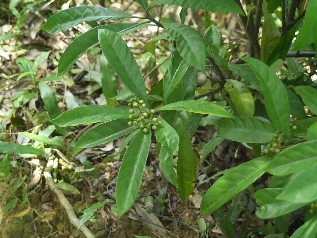 Psychotria asiatica：ボチョウジ 2009/08/10 沖縄県西表島：Iriomote Island, Japan